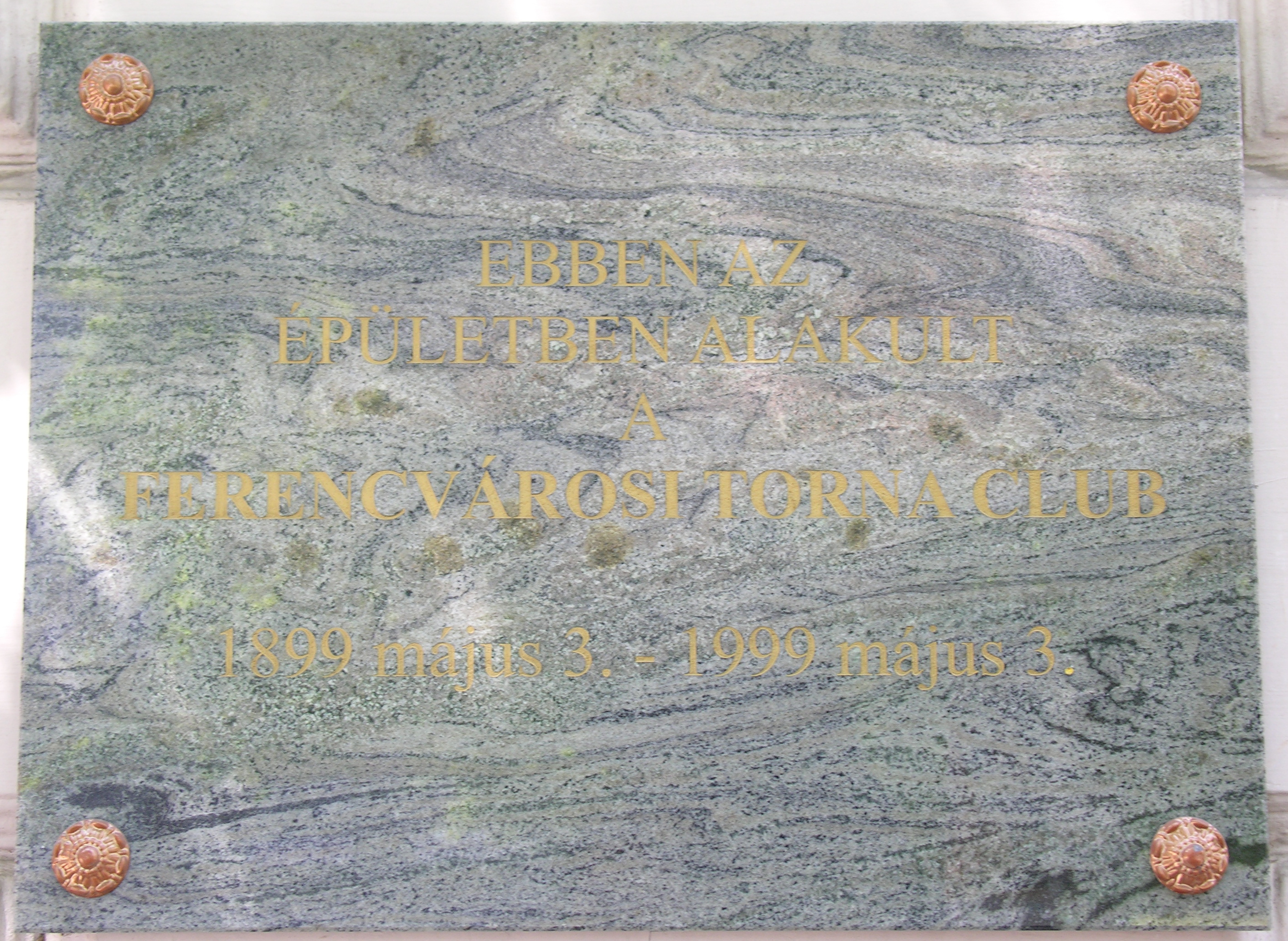 Ferencvárosi Torna Club emléktáblája, Budapest, IX., Bakáts tér 14.